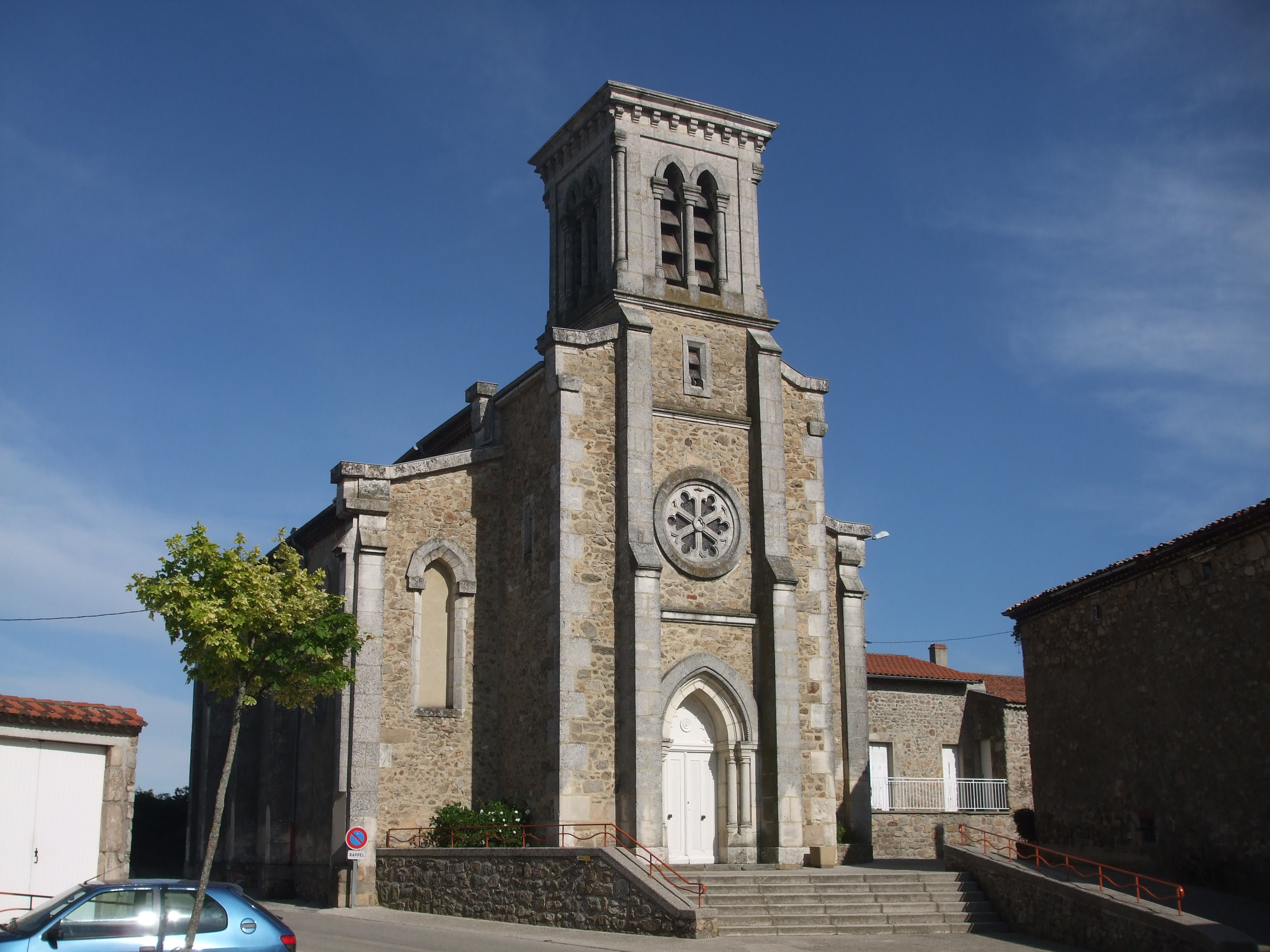 église Ste Philomène